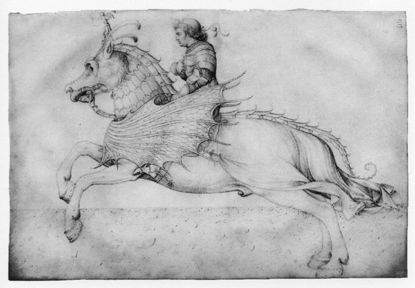 Ross und Reiter im Harnisch. Zeichnung von Jacopo Bellini im Louvre, Cabinet des Dessins